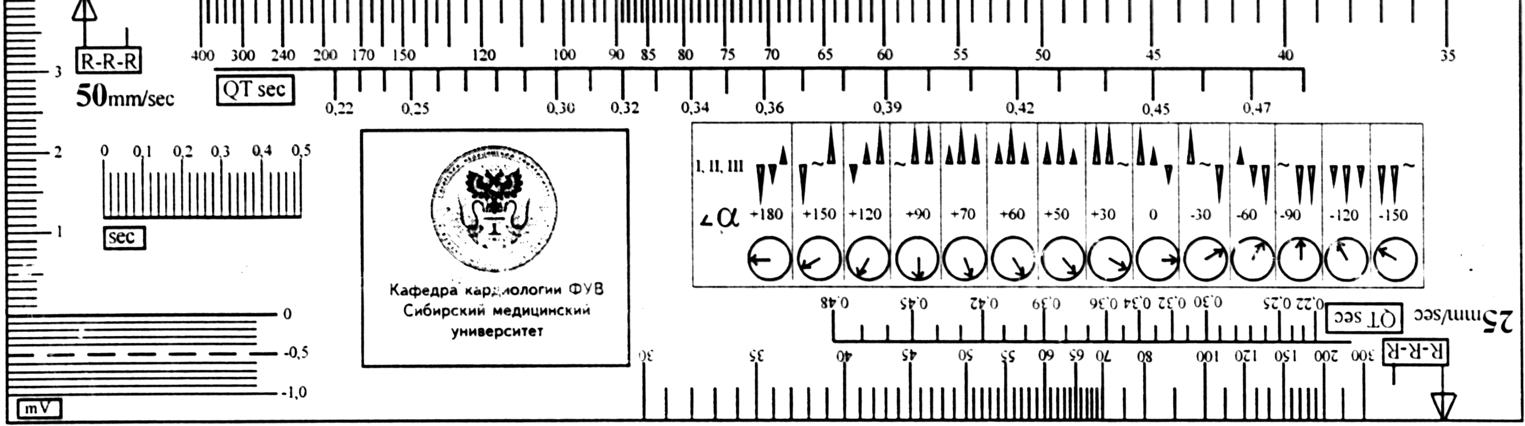 Линейка для анализа ЭКГ, снабжена несколькими шкалами и номограмой для определения угла альфа с точностью до 5 - 15º. Разработана Посоховым И.Н. На номограмме указано соотношение амплитуды и направленности зубцов в стандартных отведениях. Размеры при печати (300 точек на дюйм): 25,95 × 7,25 см.